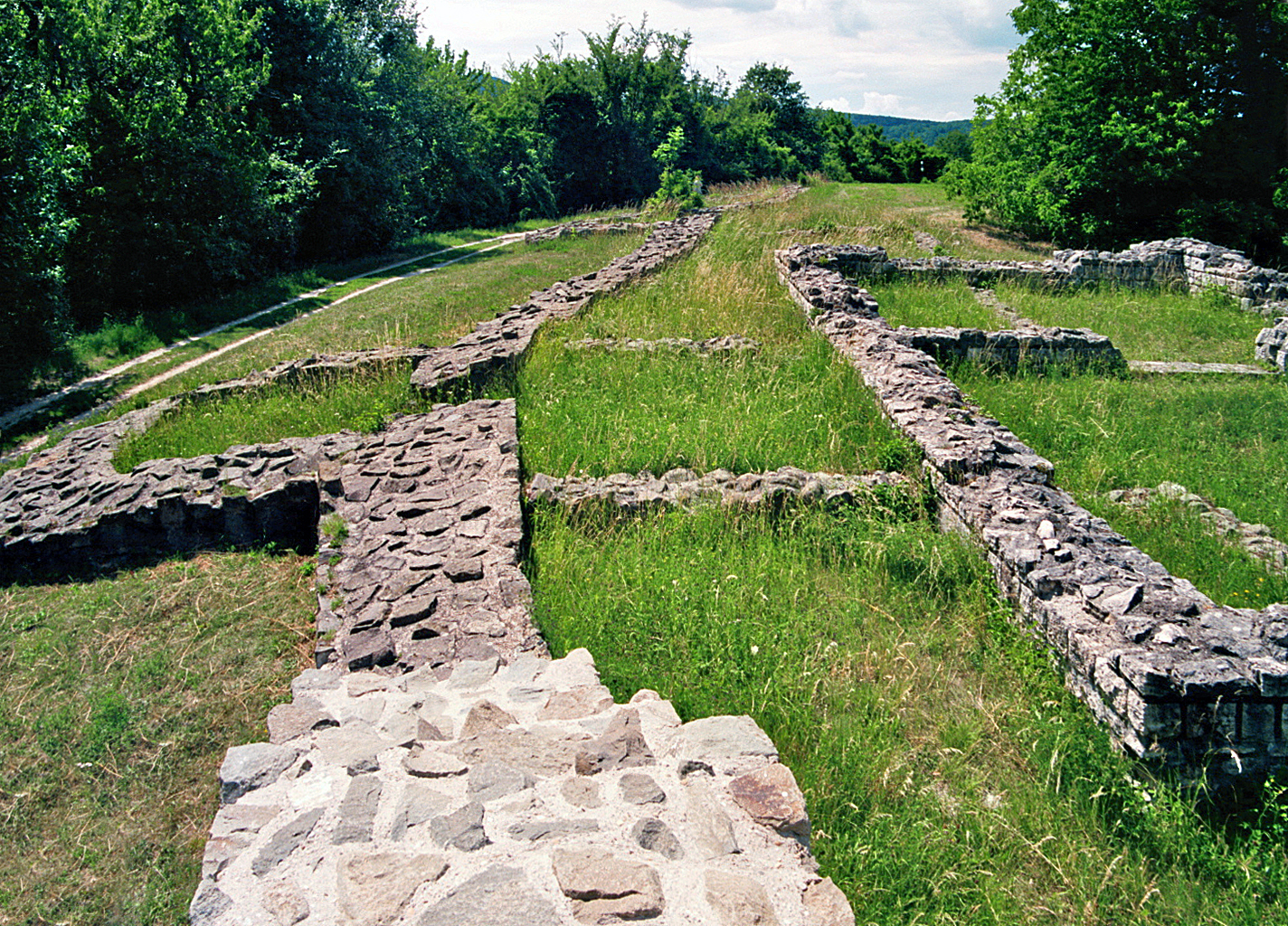 Kastell Visegrád–Sibrik (Ungarn): Südmauer des spätrömischen Kastells mit einem mittelalterlichen Einbau (rechts).